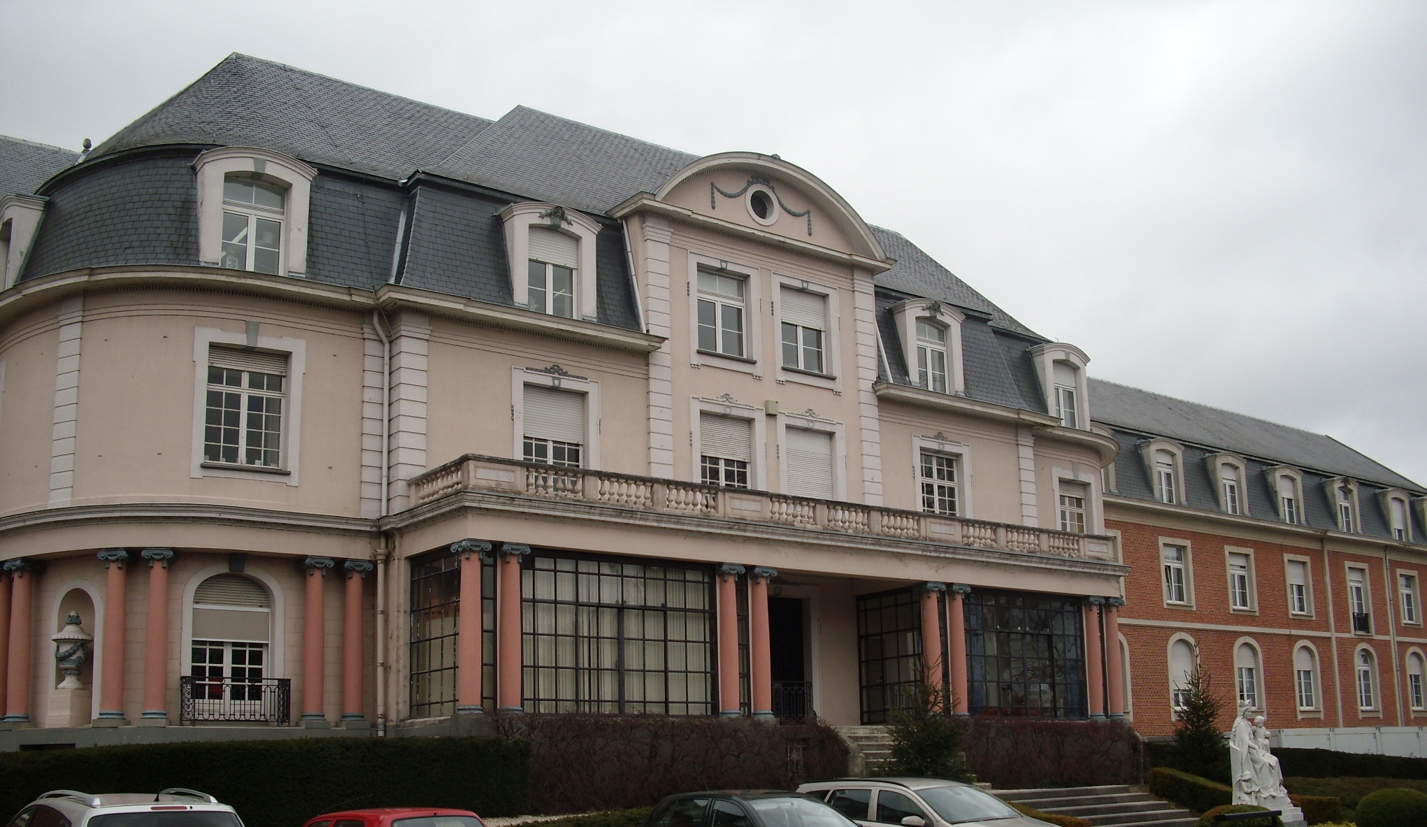 Villa Hanus - de kern van het AZ Maria Middelares - de rechtervleugel kwam er in 1939 - Kortrijksesteenweg - Gent - Oost-Vlaanderen - Vlaanderen - België